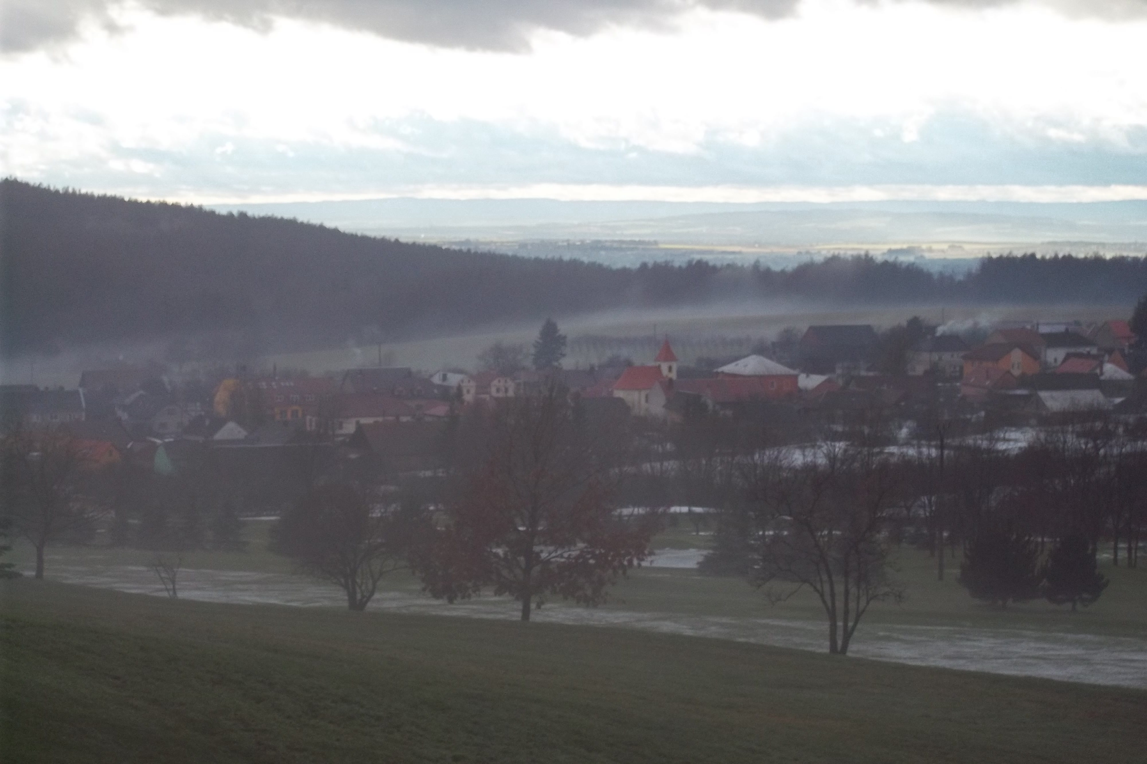 Foto je z golfu.